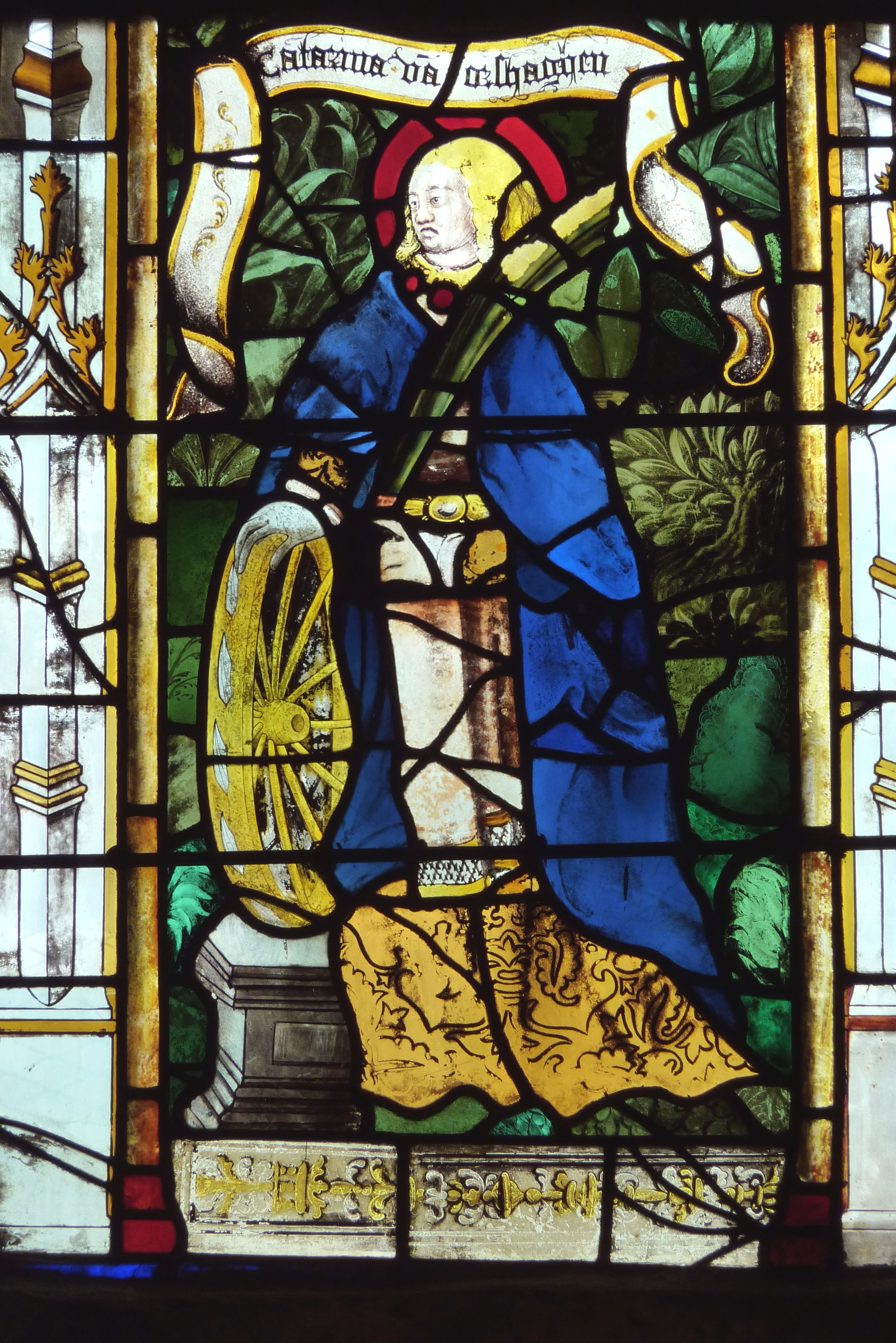 Bleiglasfenster in der katholischen Pfarrkirche Saint-Jean-Baptiste in Sceaux im Département Hauts-de-Seine in der Île-de-France, Darstellung: hl. Katharina von Alexandrien